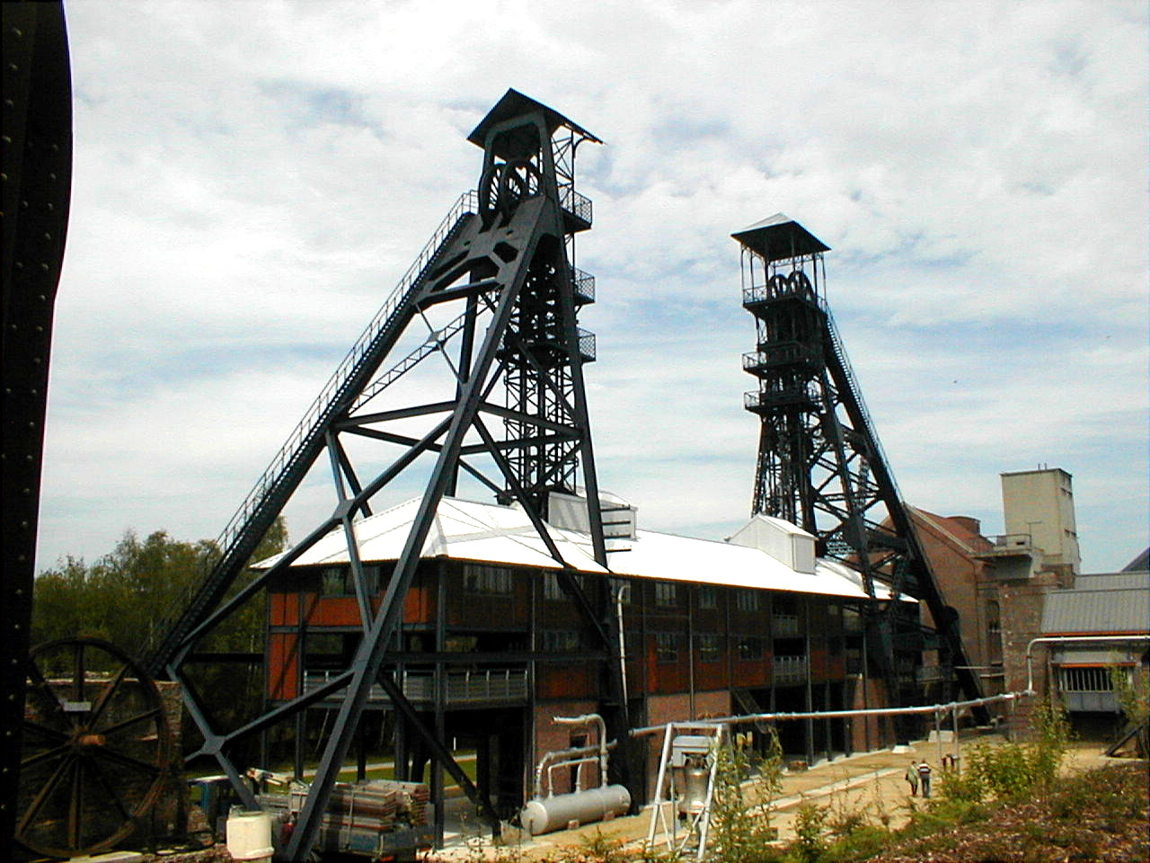 Vue du chassi à molette du Bois du Cazier 5